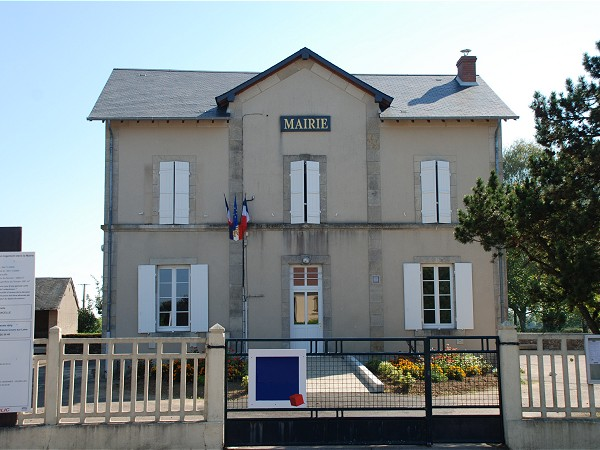 Mairie de la Collancelle